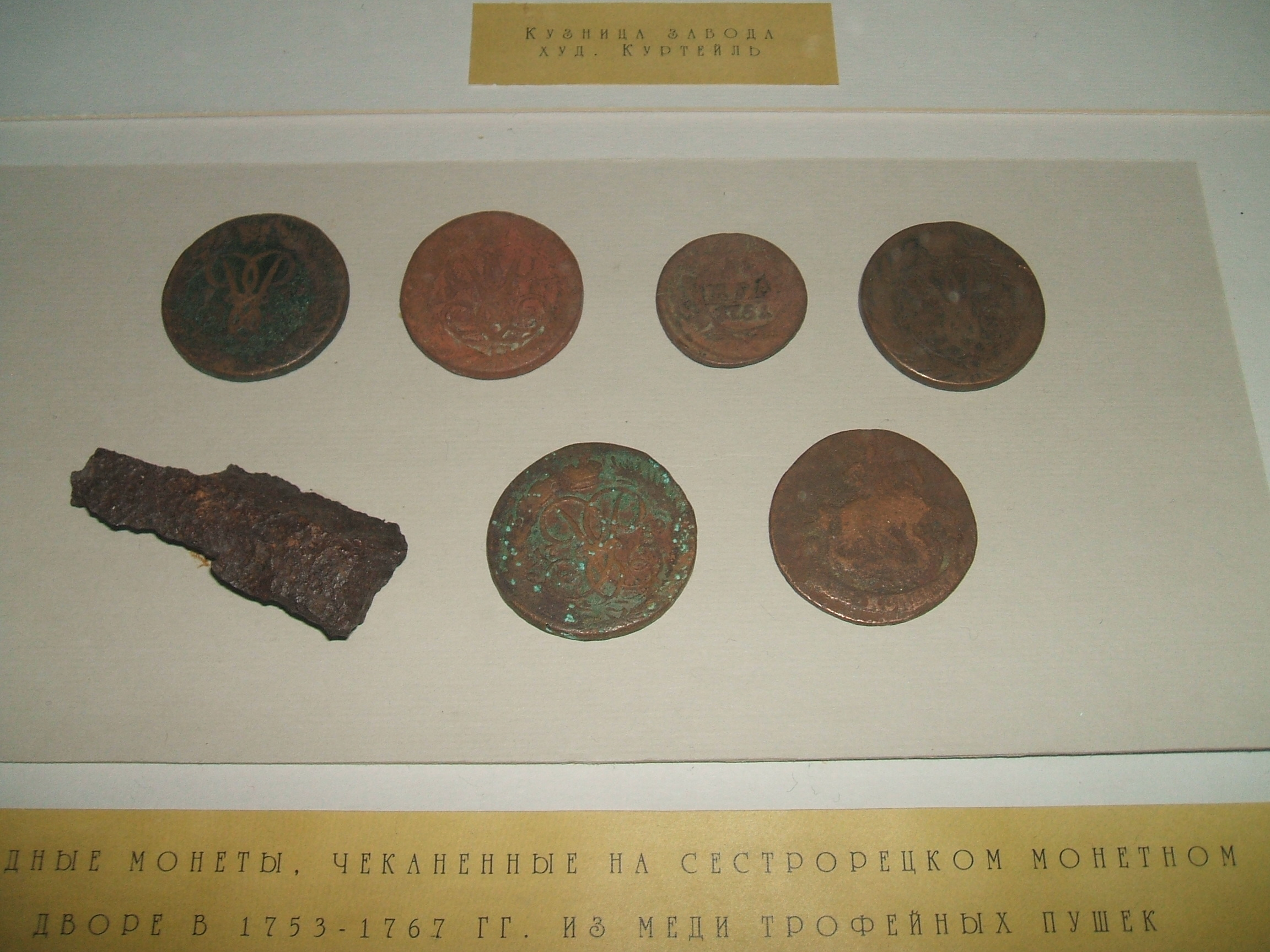 фотография натуральных сестрорецких денег отчеканеных на оружейном заводе - экспонат музея "Санатория "Сестрорецки курорт"